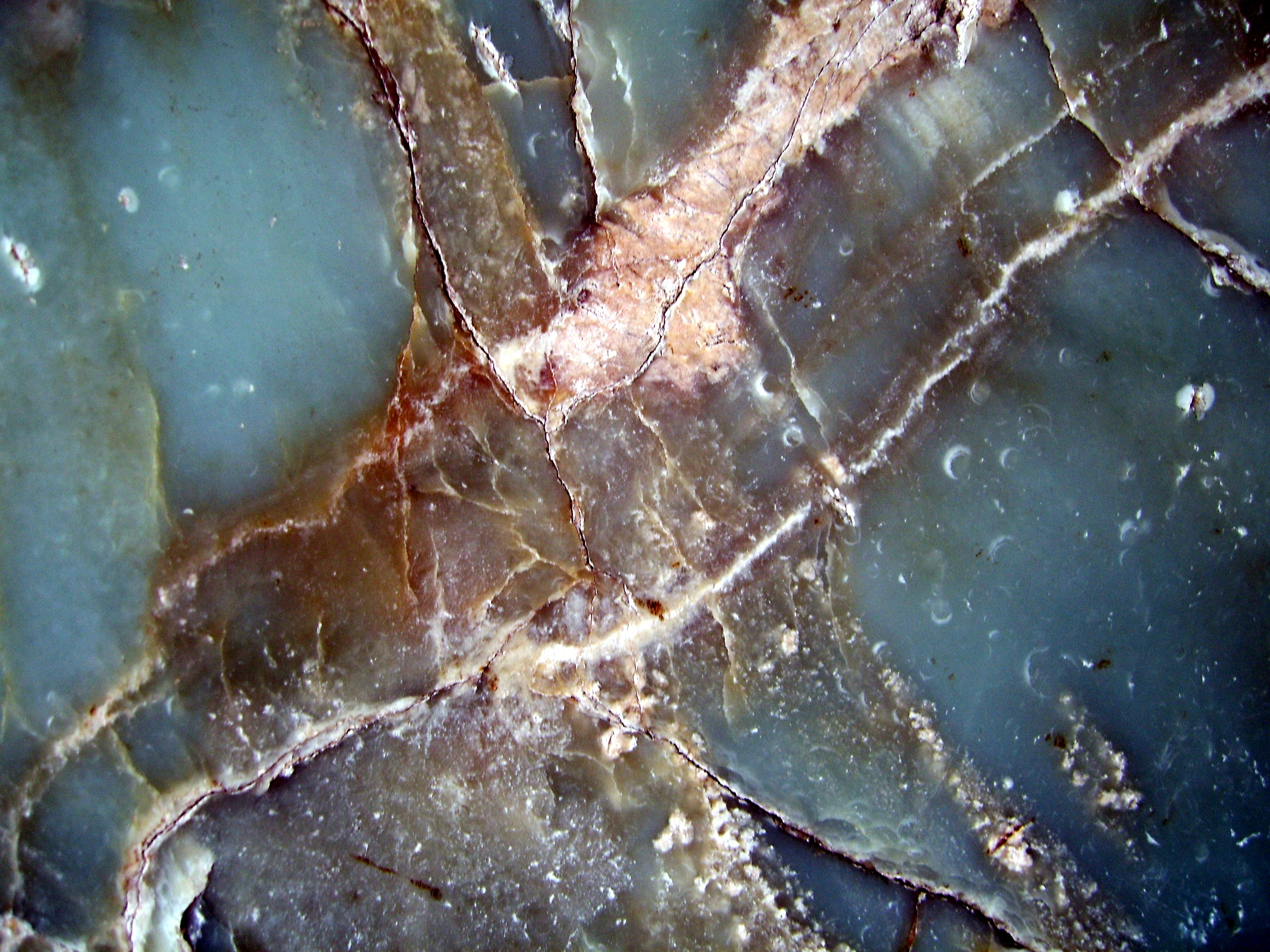 软玉，产于新疆和田，